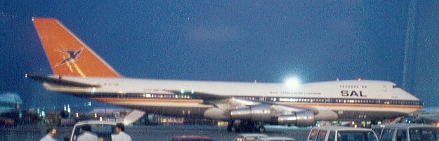 FC Georgio Avion SAA, Jan Smuts Airport, Johannesburg 1991